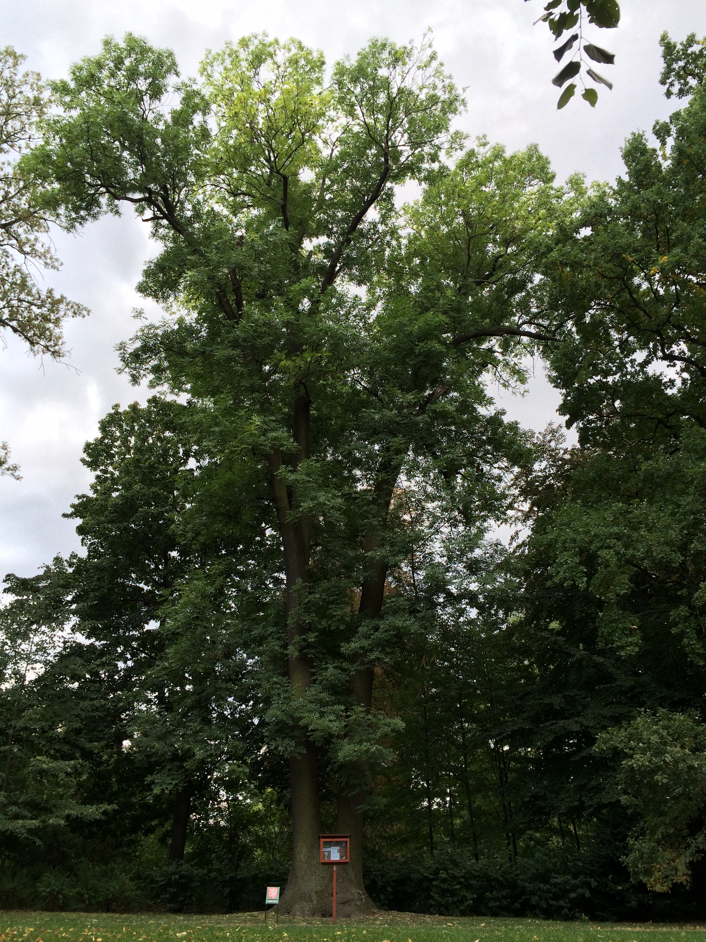 Památný strom jasan ztepilý nacházející se v jižní části zámeckého parku v Čakovicích.